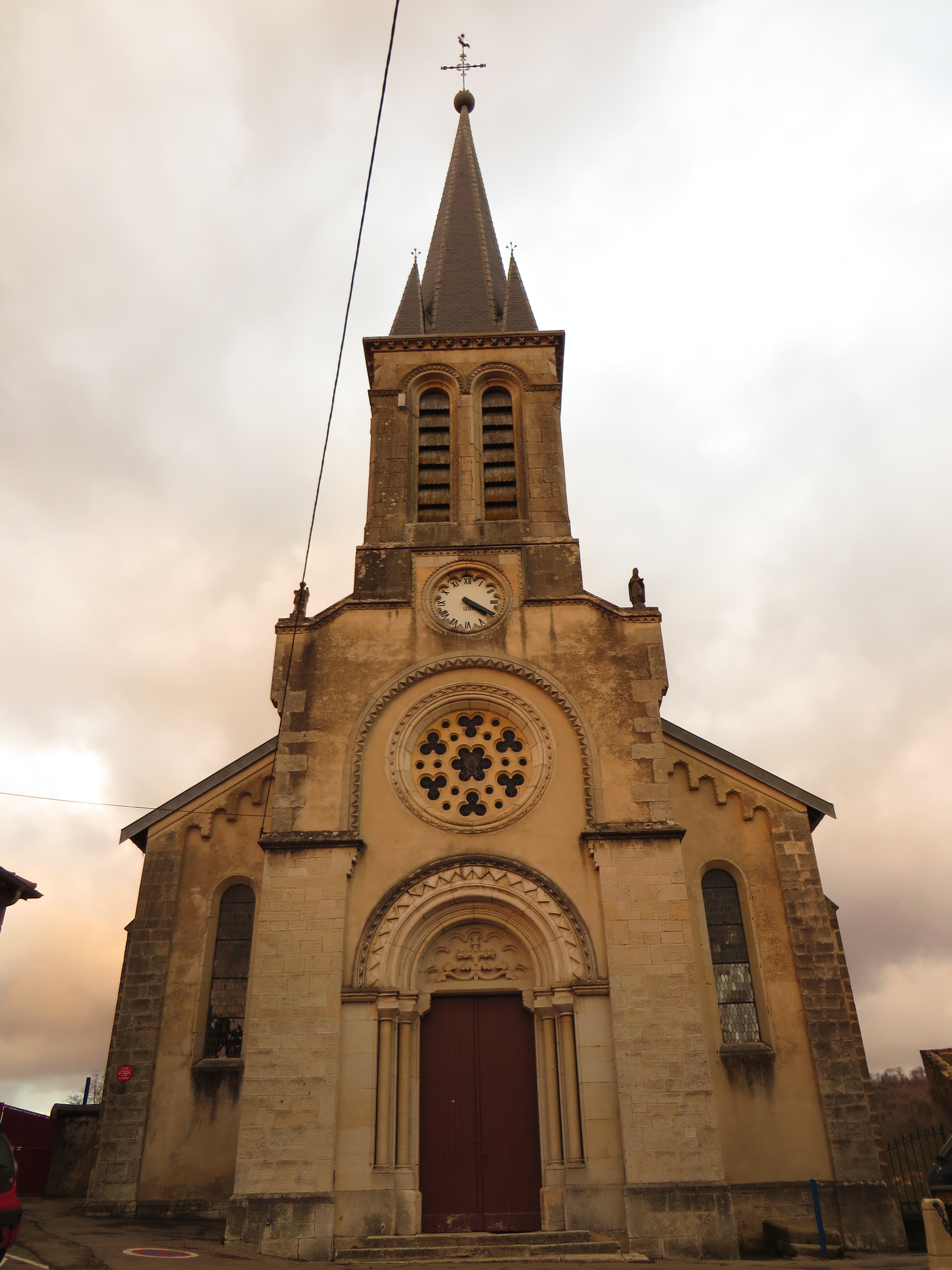 Sexey Forges eglise